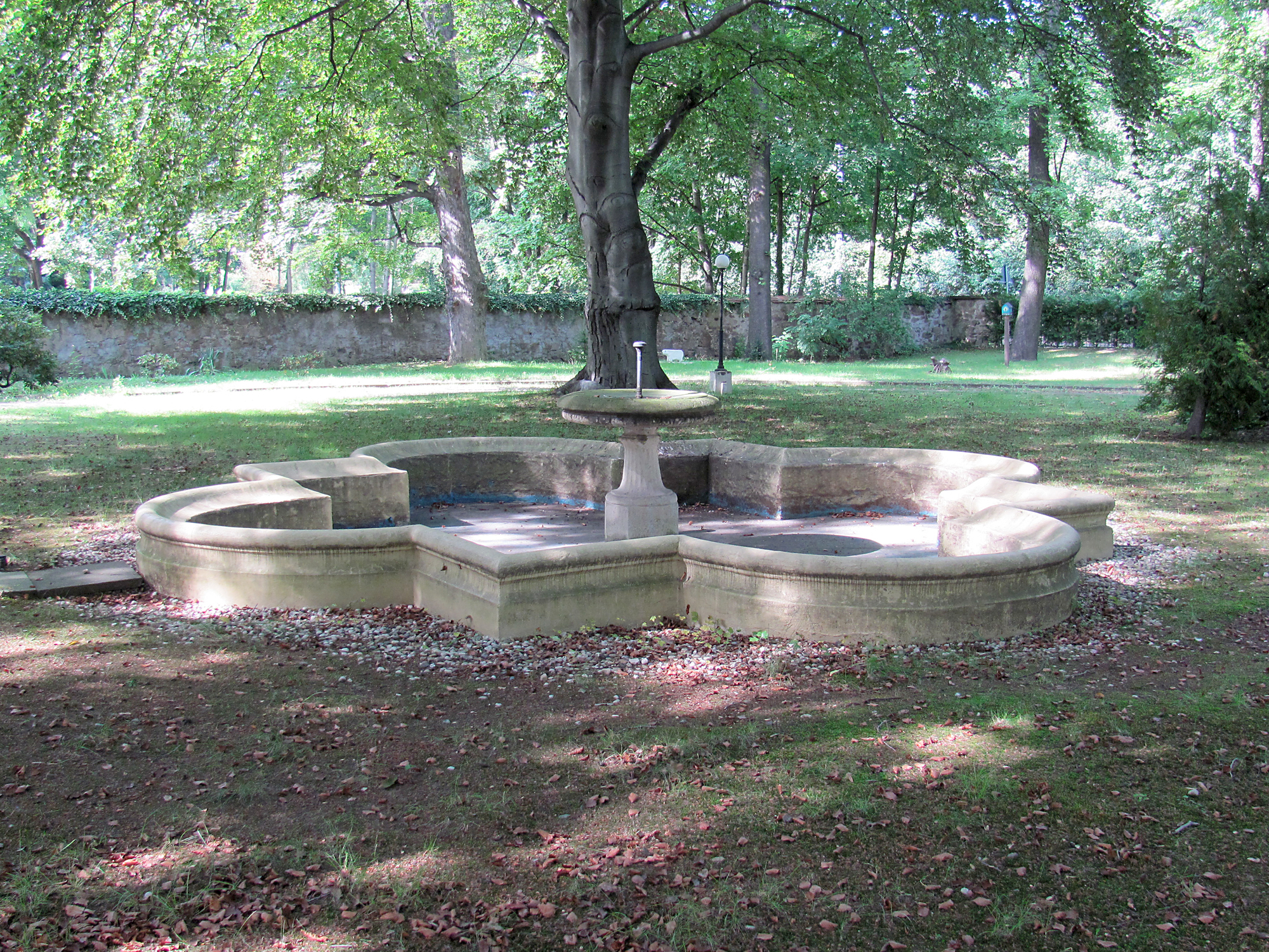 Radebeul, Villa Tanger: Springbrunnen